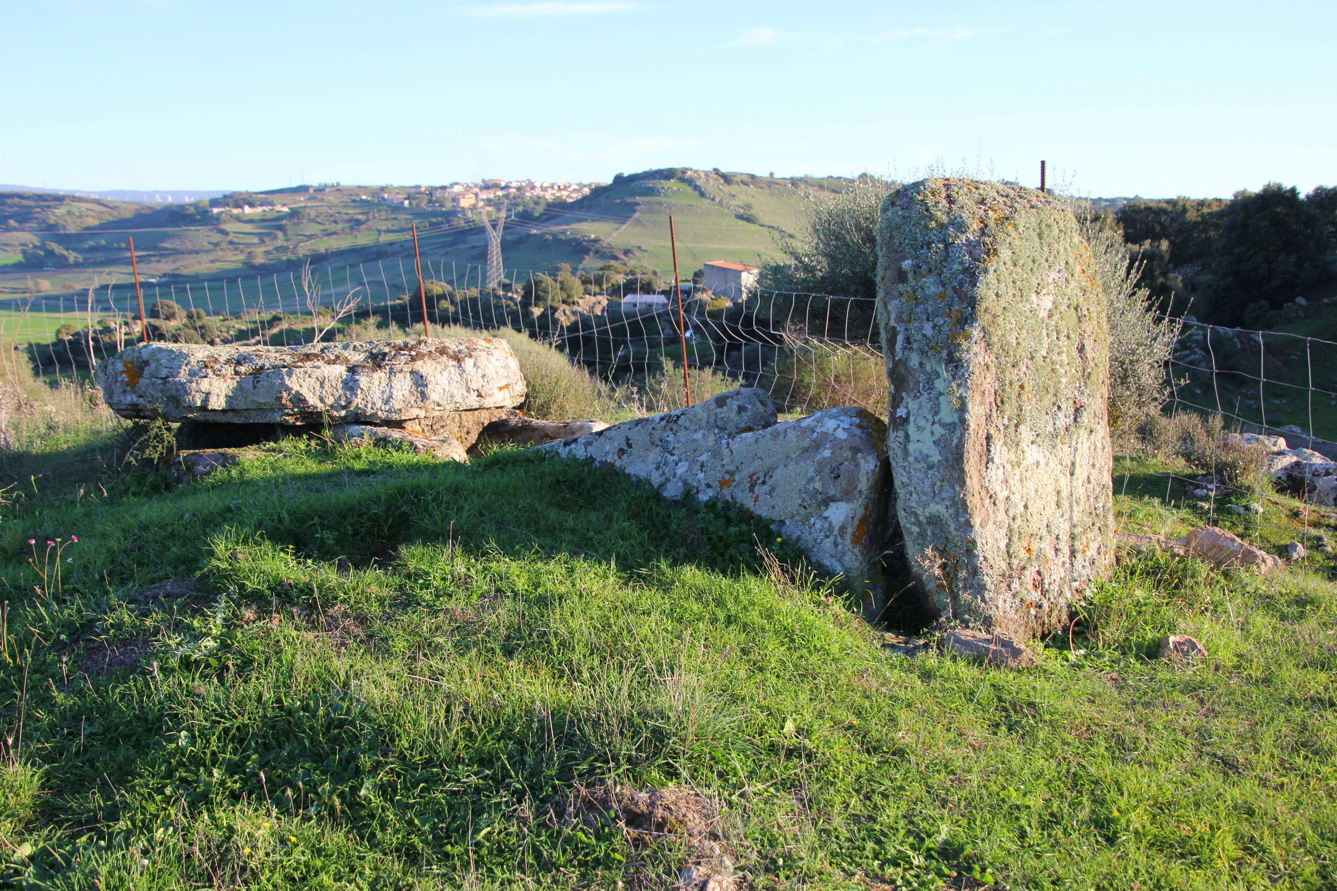 Cossoine - Tomba dei giganti di Paddeu o Su Truppu